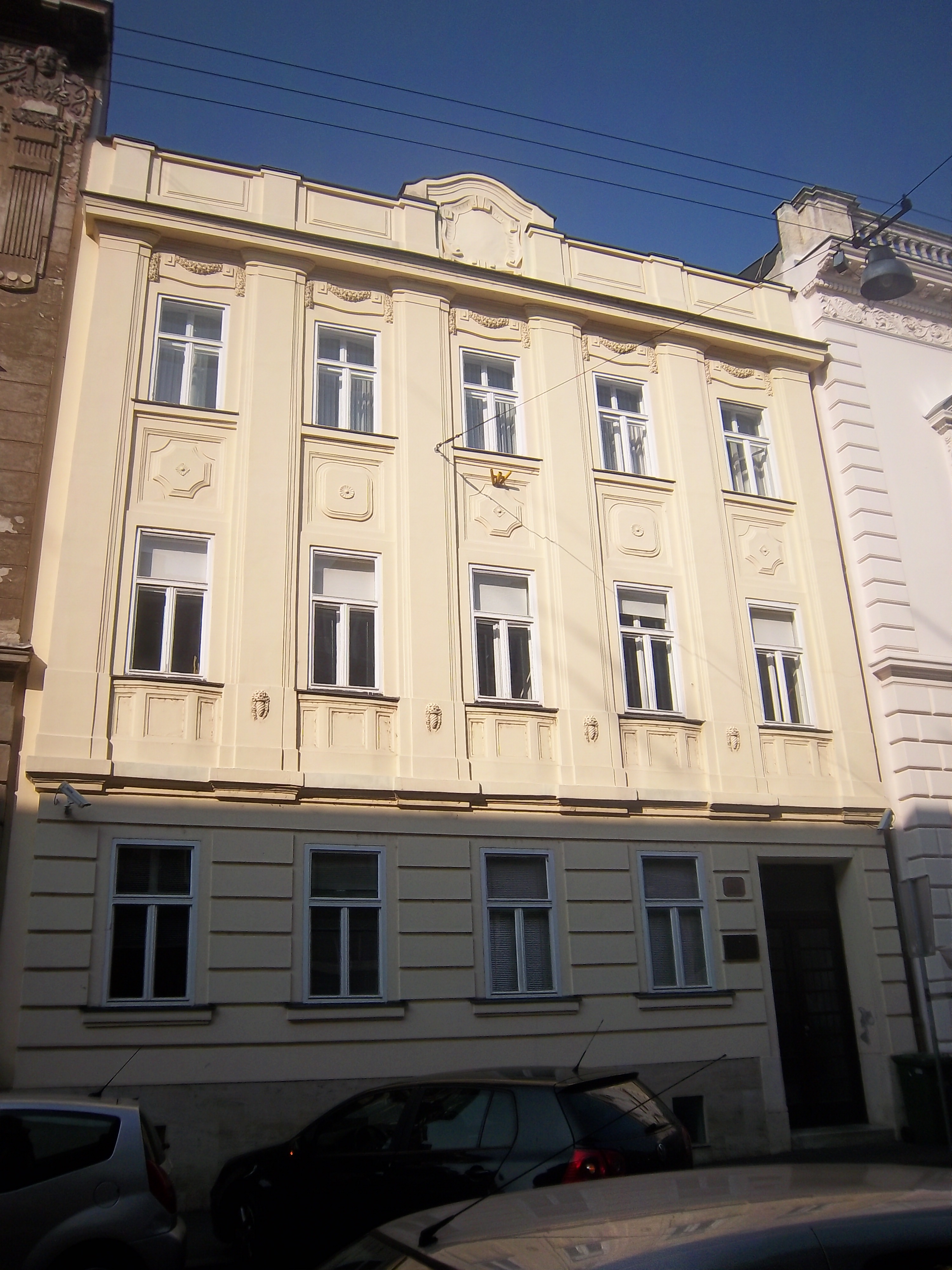 Srpskohrvatski / српскохрватски: Zgrada Prosvjete u Zagrebu